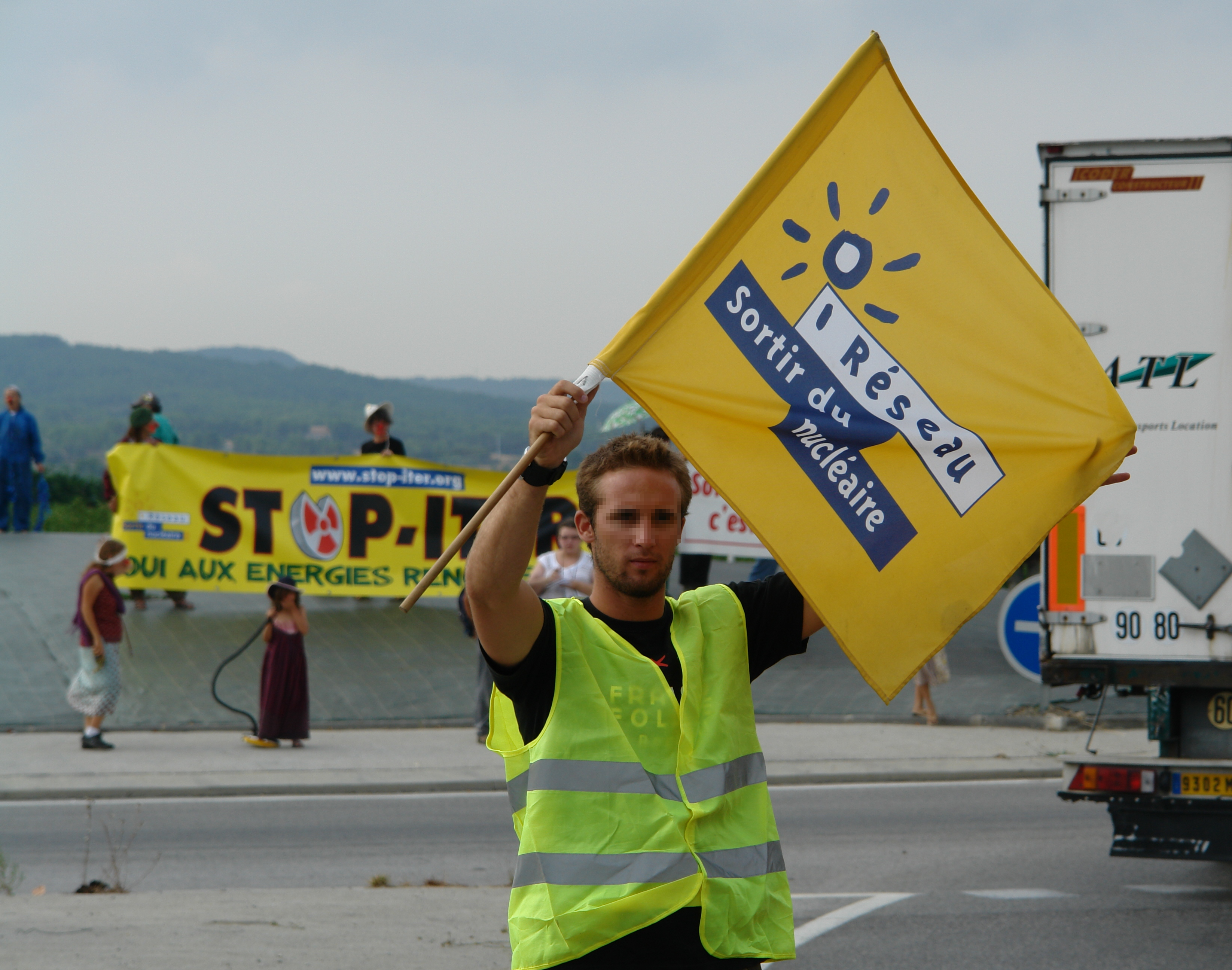 Bannière du Réseau « Sortir du nucléaire ».